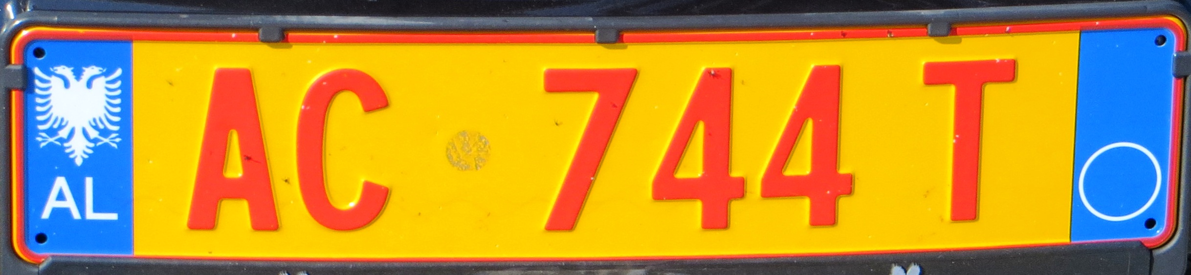 Nieuwe taxi kenteken plaat Albanië